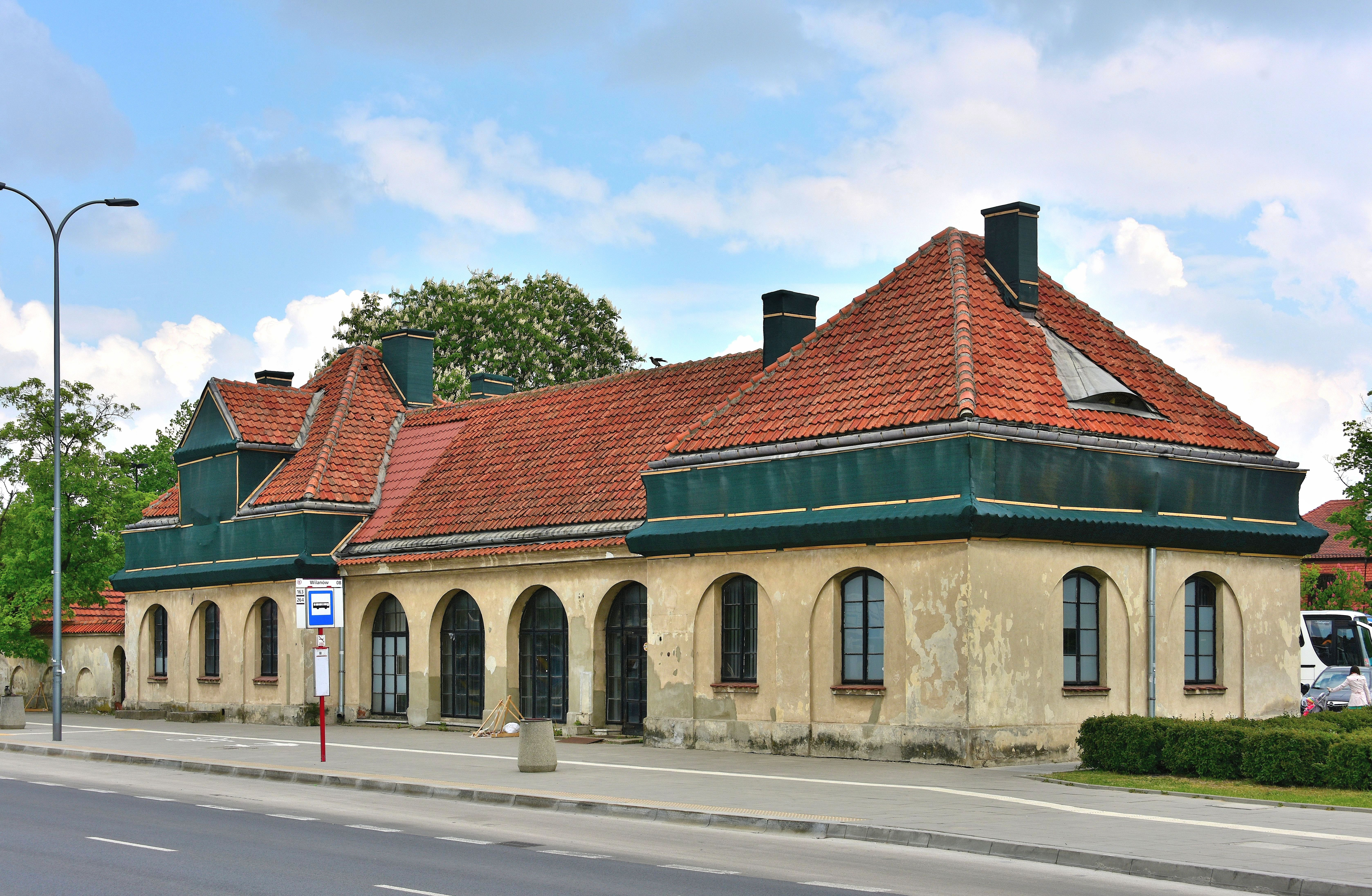 Budynek dawnej stacji kolejki wilanowskiej w Wilanowie